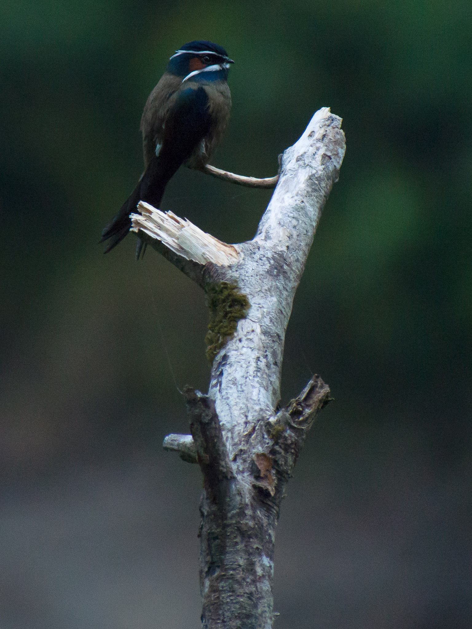 Whiskered Treeswift